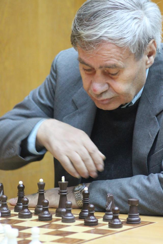 Шахматист Эдуард Мнацаканян